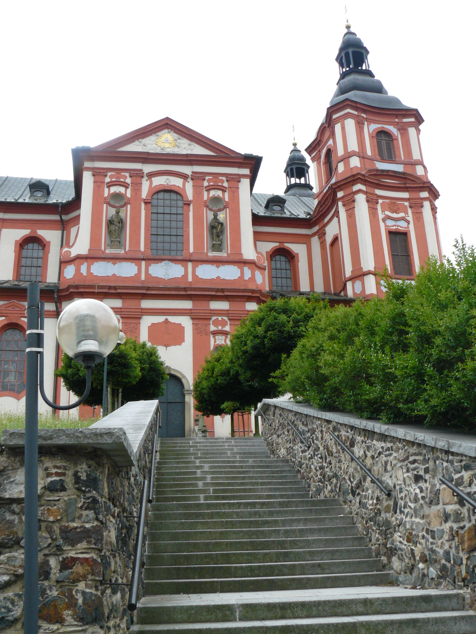 Kostel Nanebevzetí Panny Marie v Přešticích